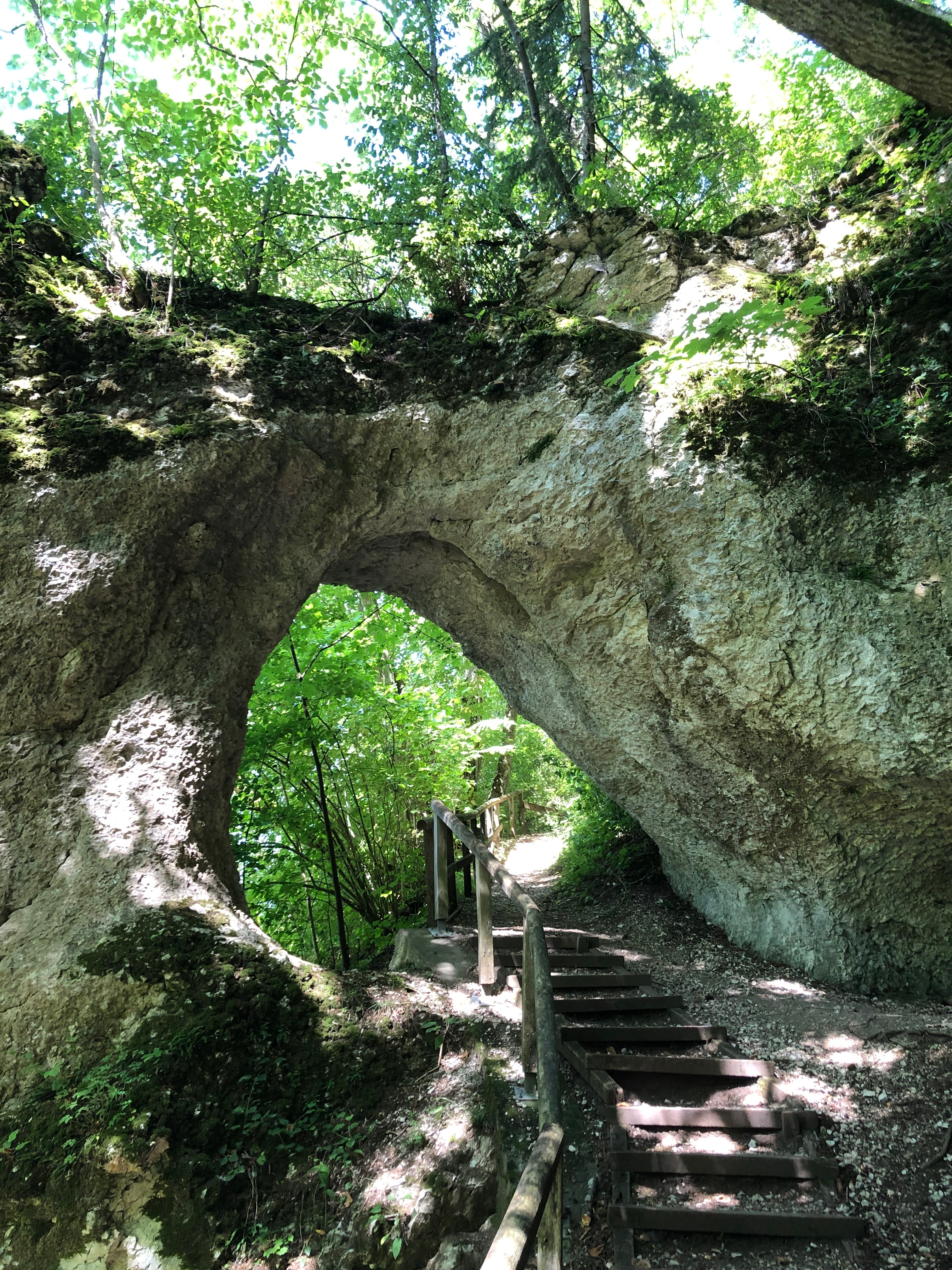 Felsentor im Fürstlichen Park Inzigkofen